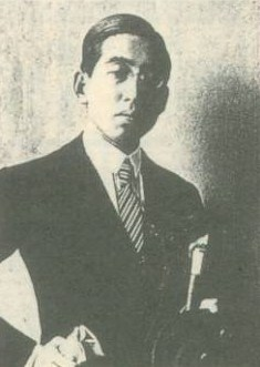 堀口大學肖像。大正13年（1924年）ルーマニア、英国大使館仮装舞踏会。